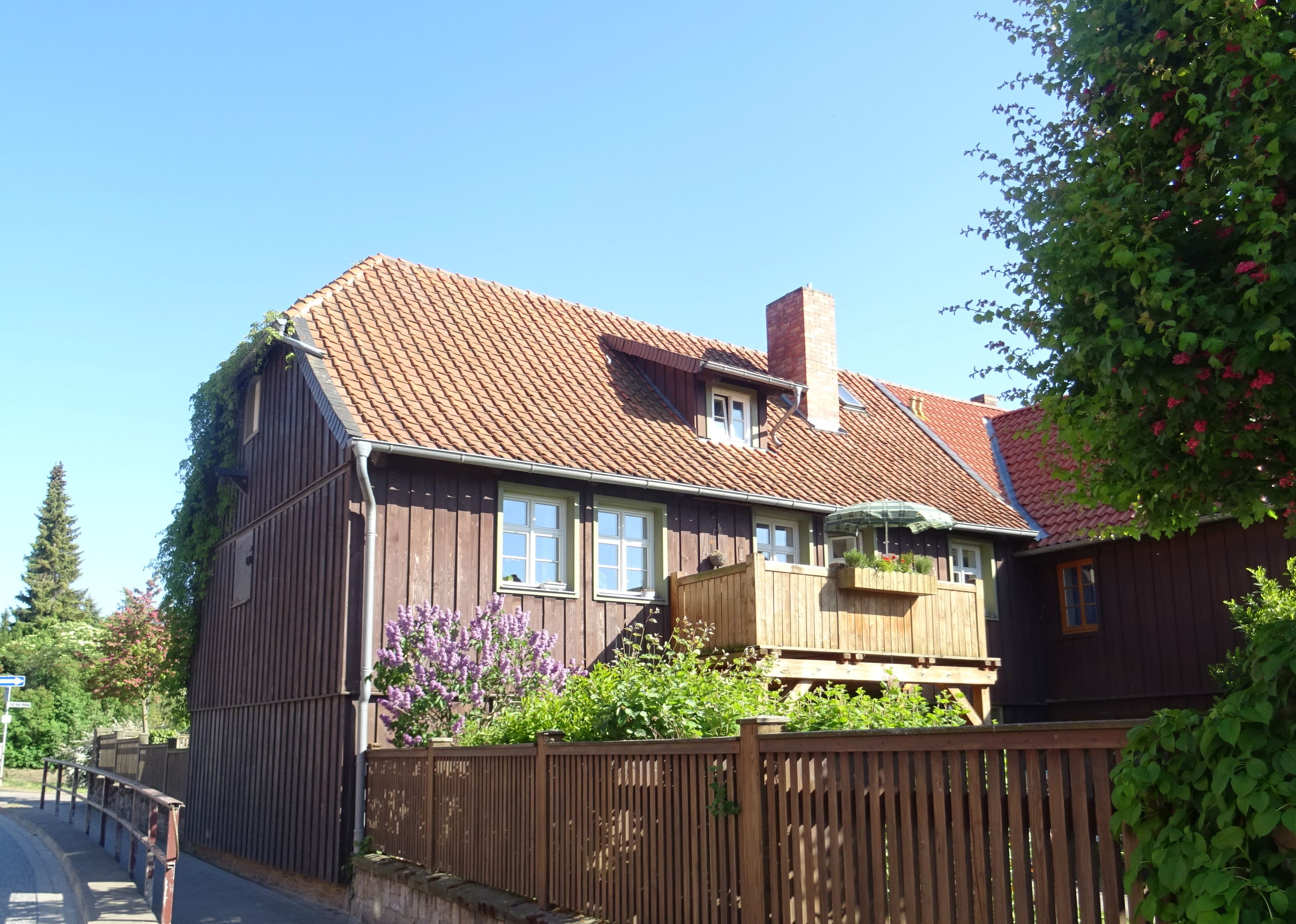 Denkmalgeschütztes Wohnhaus Darlingerode, Auf der Heide 2